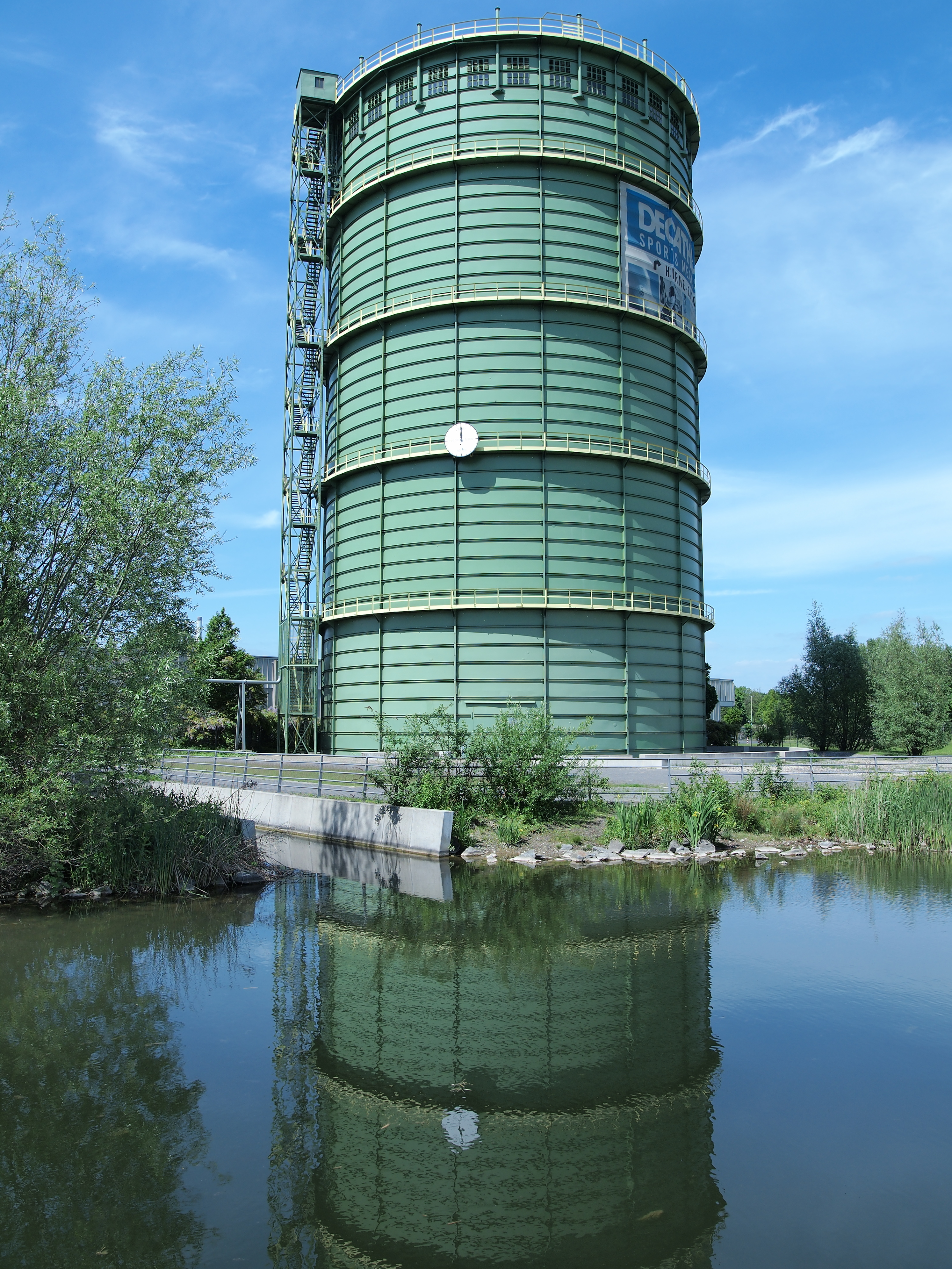 Gasbehälter der früheren Hibernia Chemiewerke in Herne, Denkmal in Herne-Mitte Holsterhausen